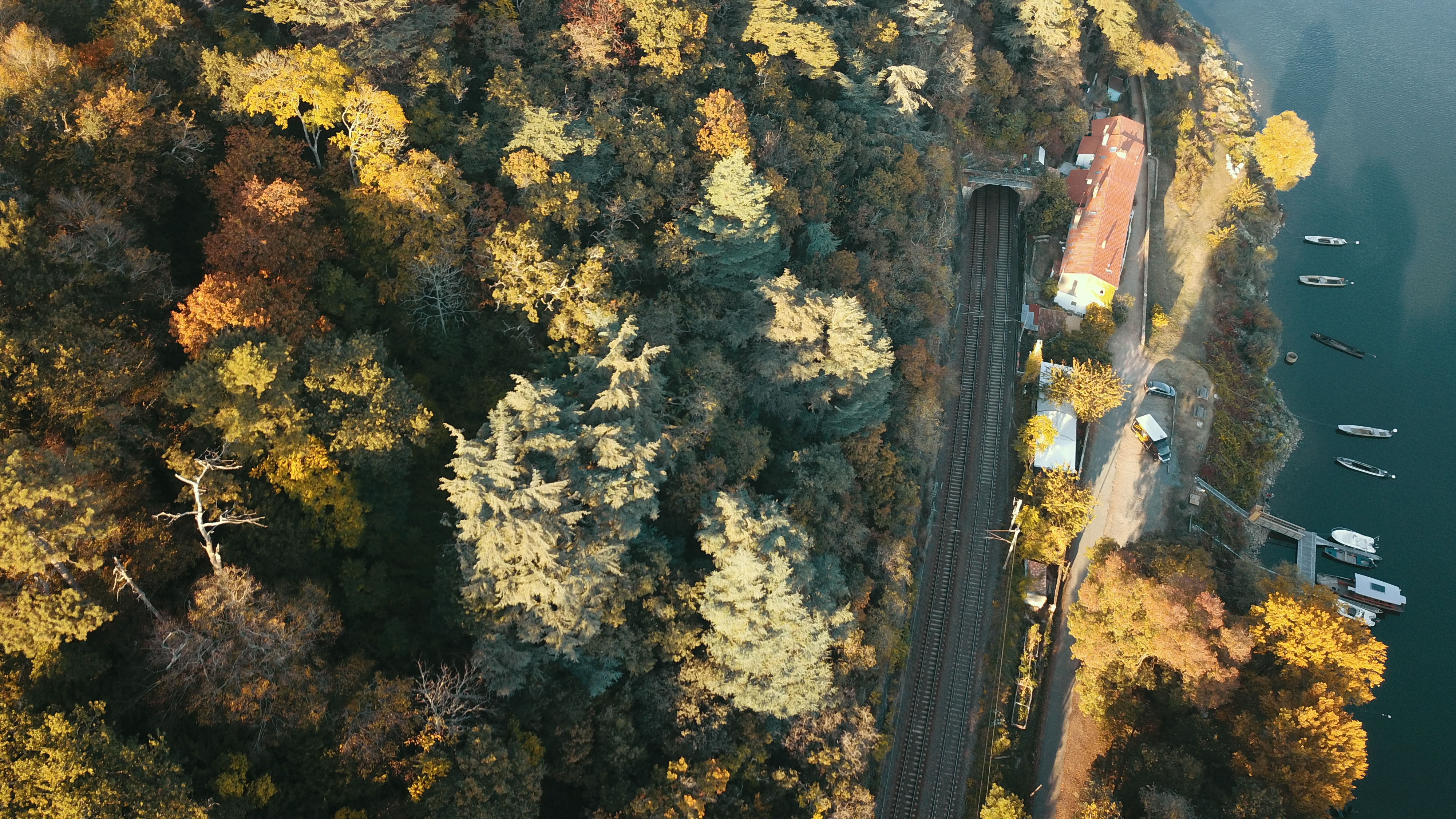 Tunnel du chemin de fer. Domaine de Clermont, Beau Rivage. Le Cellier, Loire Atantique. Vallée de la Loire.